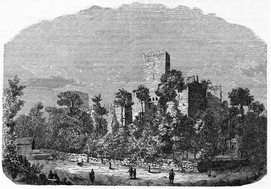 Castelo de Guimarães, numa gravura do Archivo Pittoresco de 1863.